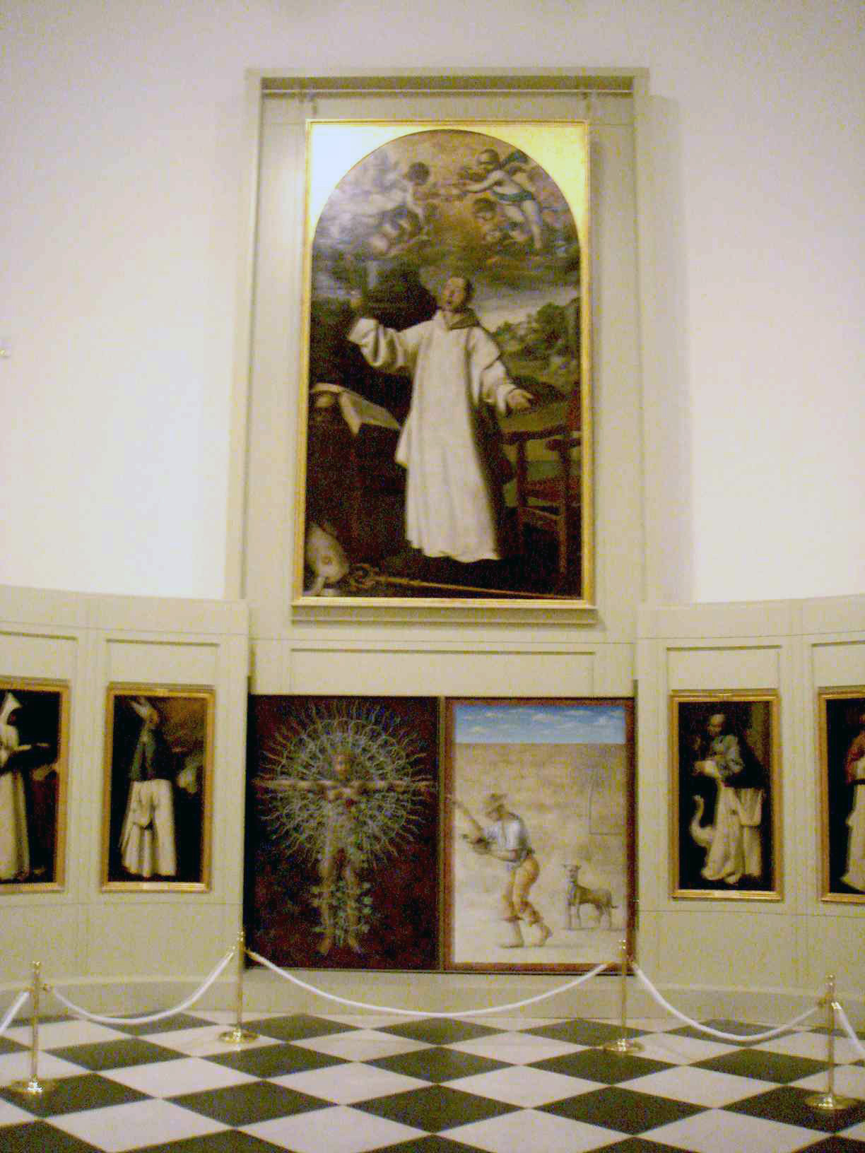 Sala de Zurbarán del Museo de Cádiz.